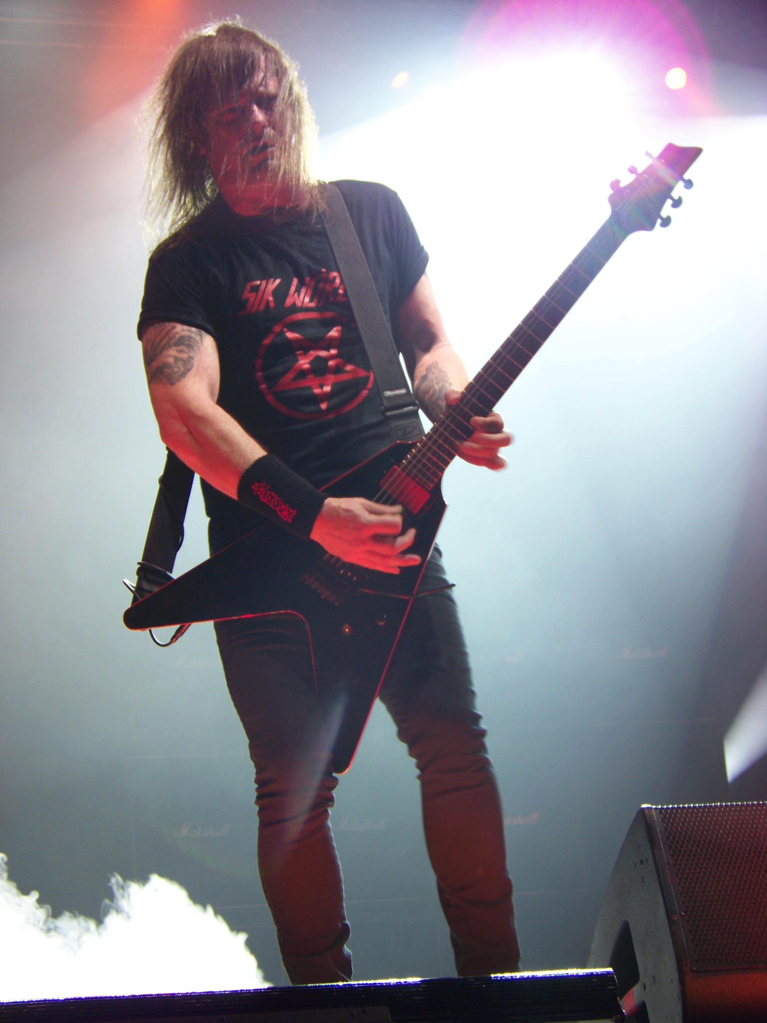 Фото Гери Холта из Exodus. Slayer. Март 2011, Киев, концерт Slayer и Megadeth. Europian Carnage Tour 2011.